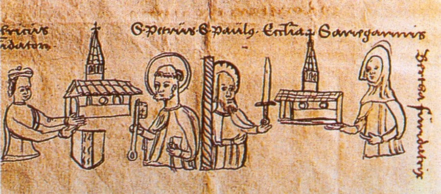 Charta fundatorum moasterii nostri Prigantini (Urkunde der Gründer unseres Klosters Bregenz) Graf Ulrich von Bregenz und seine Frau Bertha von Rheinfelden als Gründer des Klosters Mehrerau mit den Patronen St.Petrus und Paulus